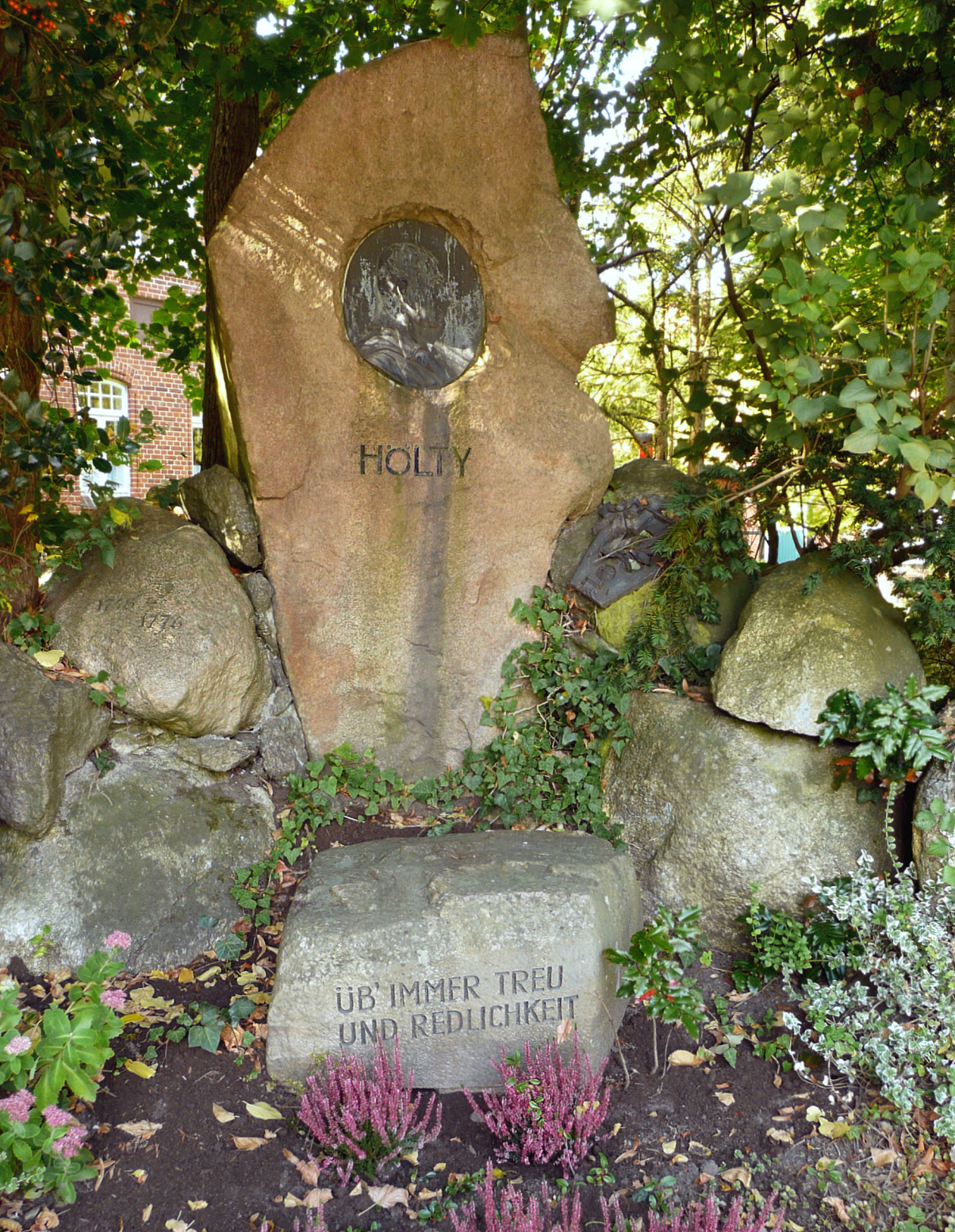 Denkmal für Ludwig Heinrich Christoph Hölty in Mariensee